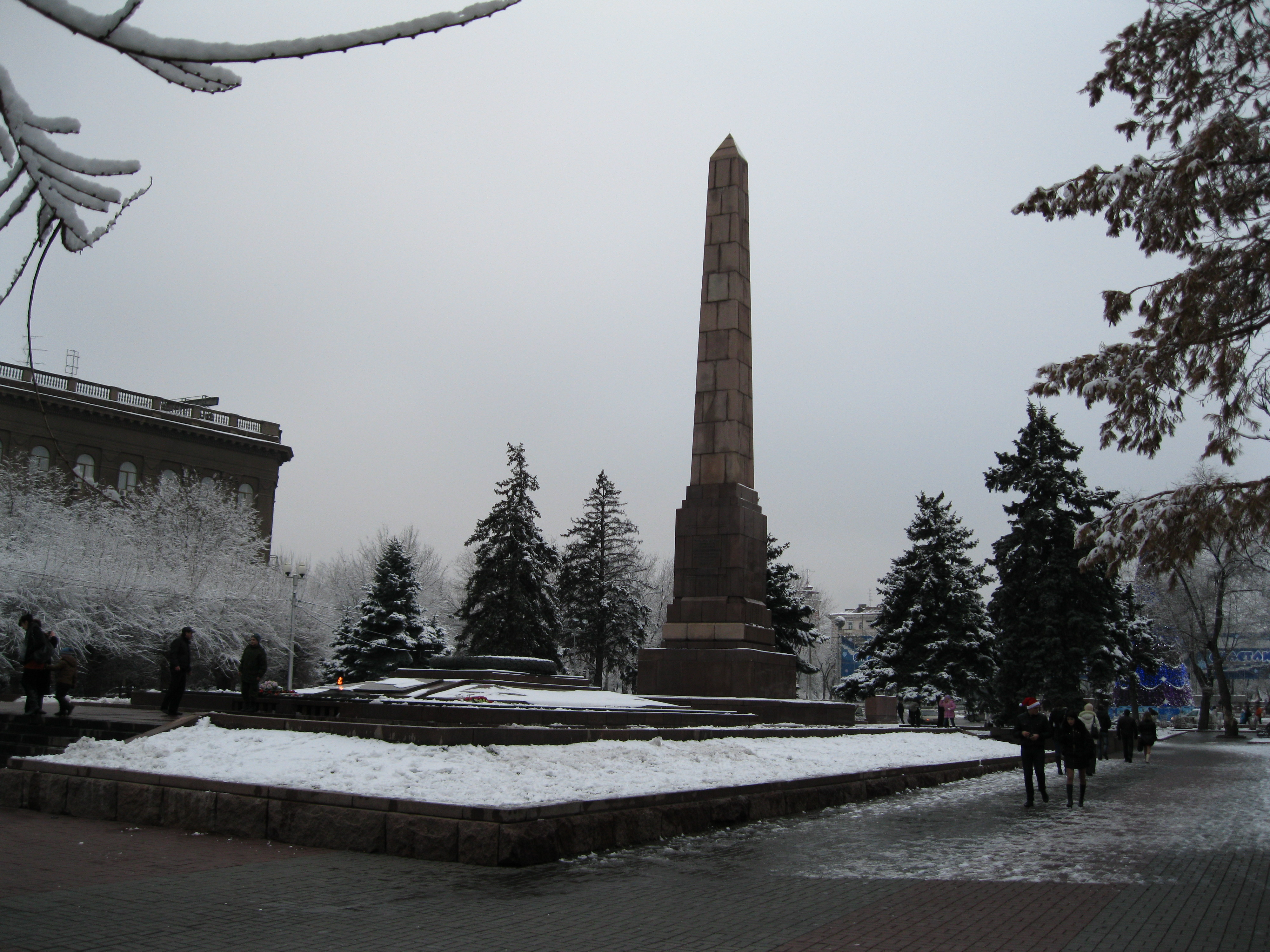 Площадь Павших борцов в Волгограде